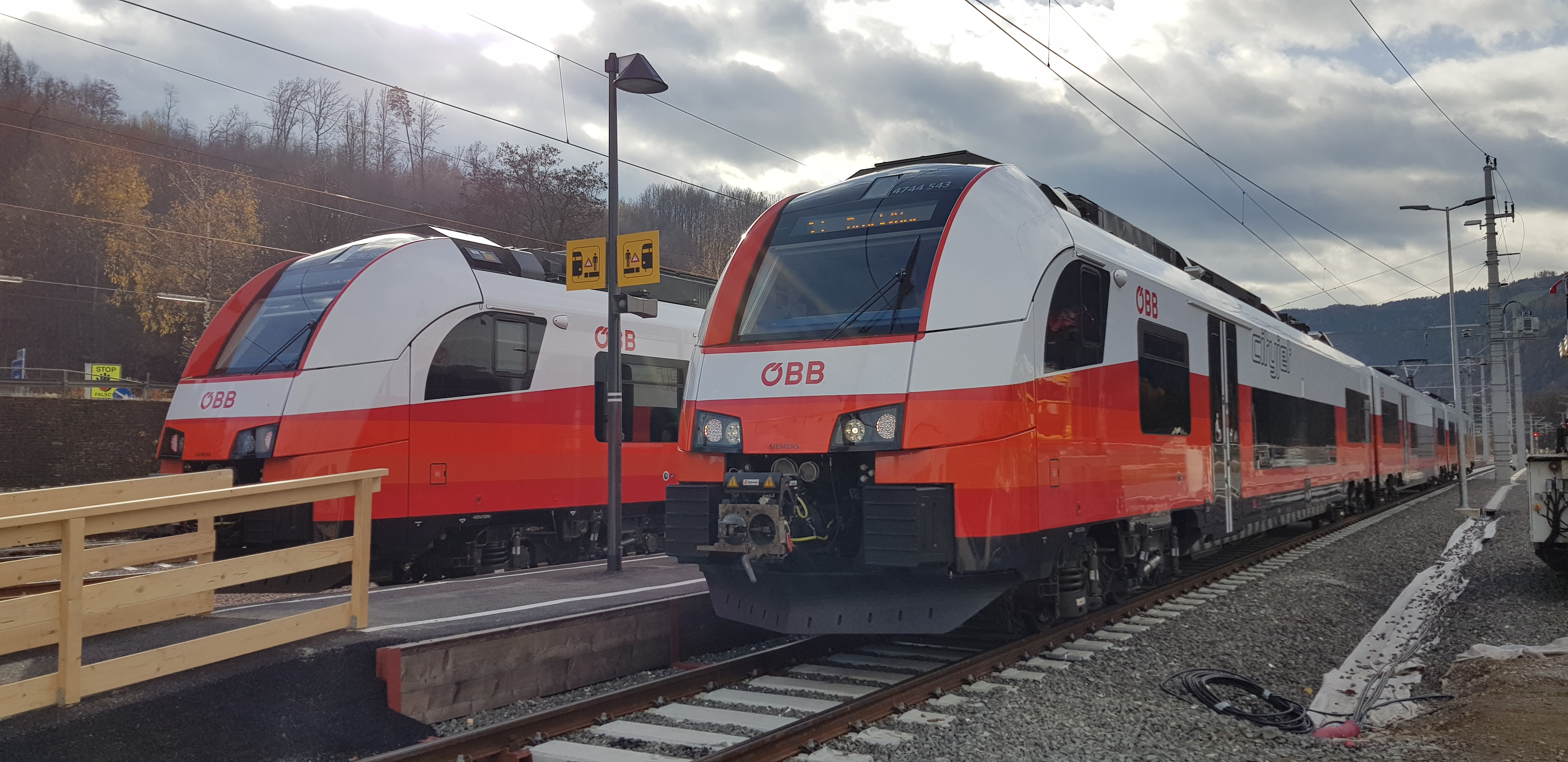 Bahnhof Frohnleiten